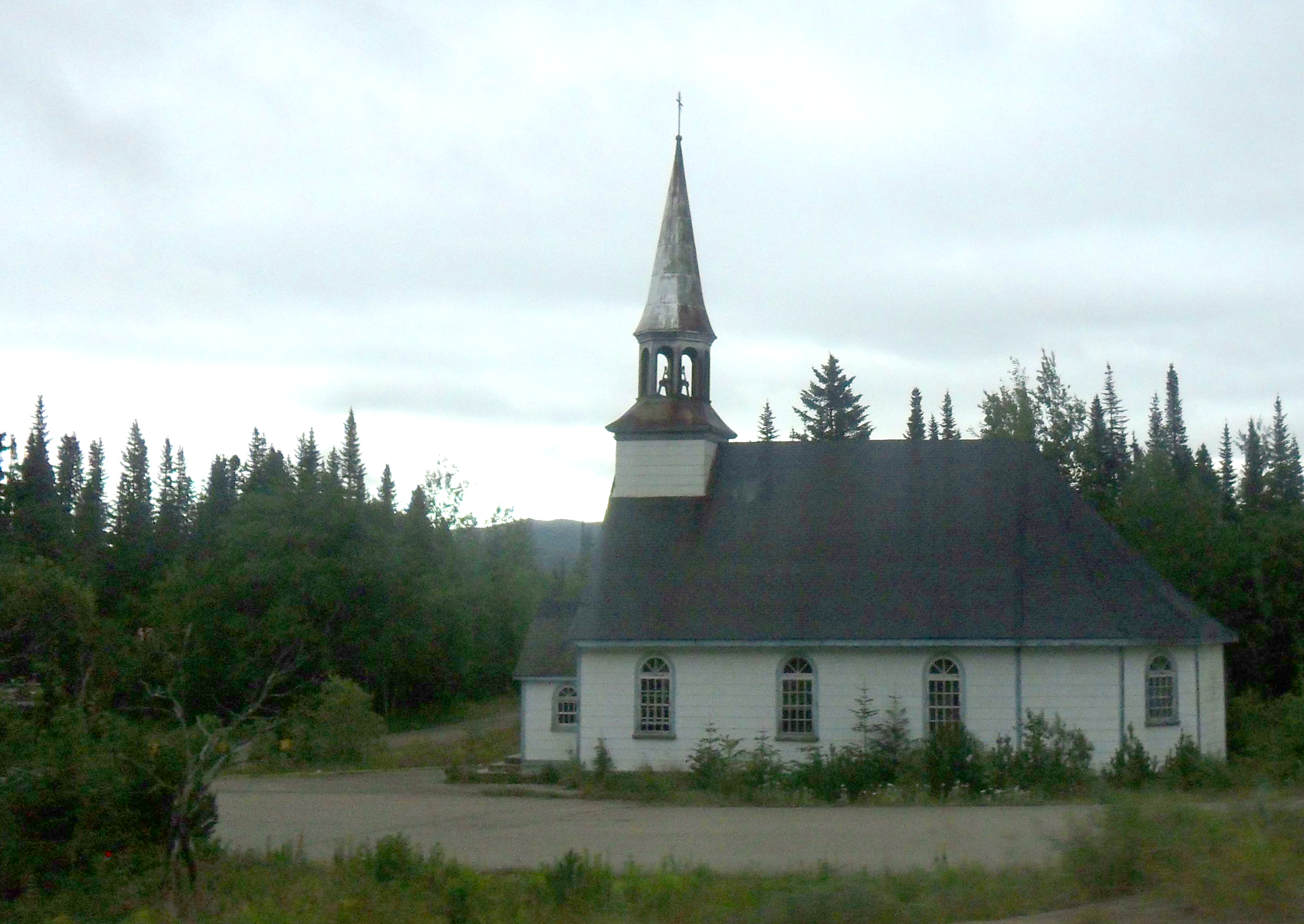 Chapelle Notre-Dame-de-L'Assomption, à l'Étape (Route 175), Québec.